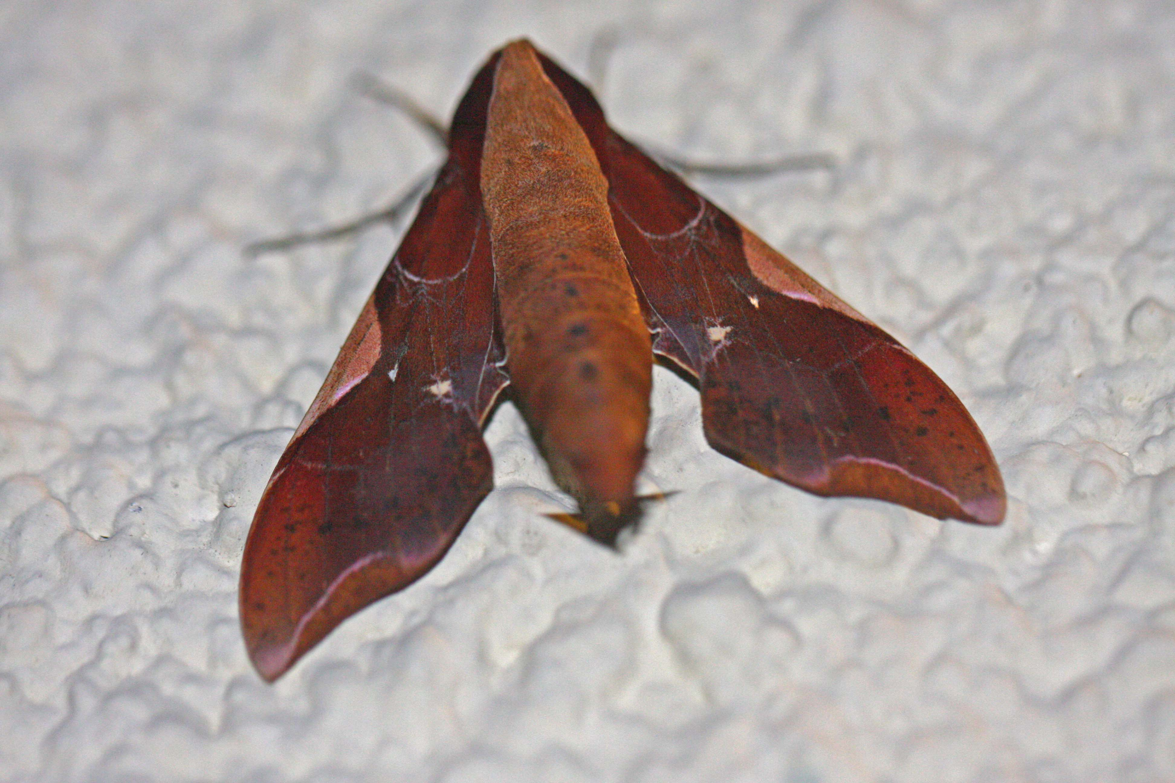 Callionima nomius (Brazil, Hotel do Ypê, 2.ix .2016)